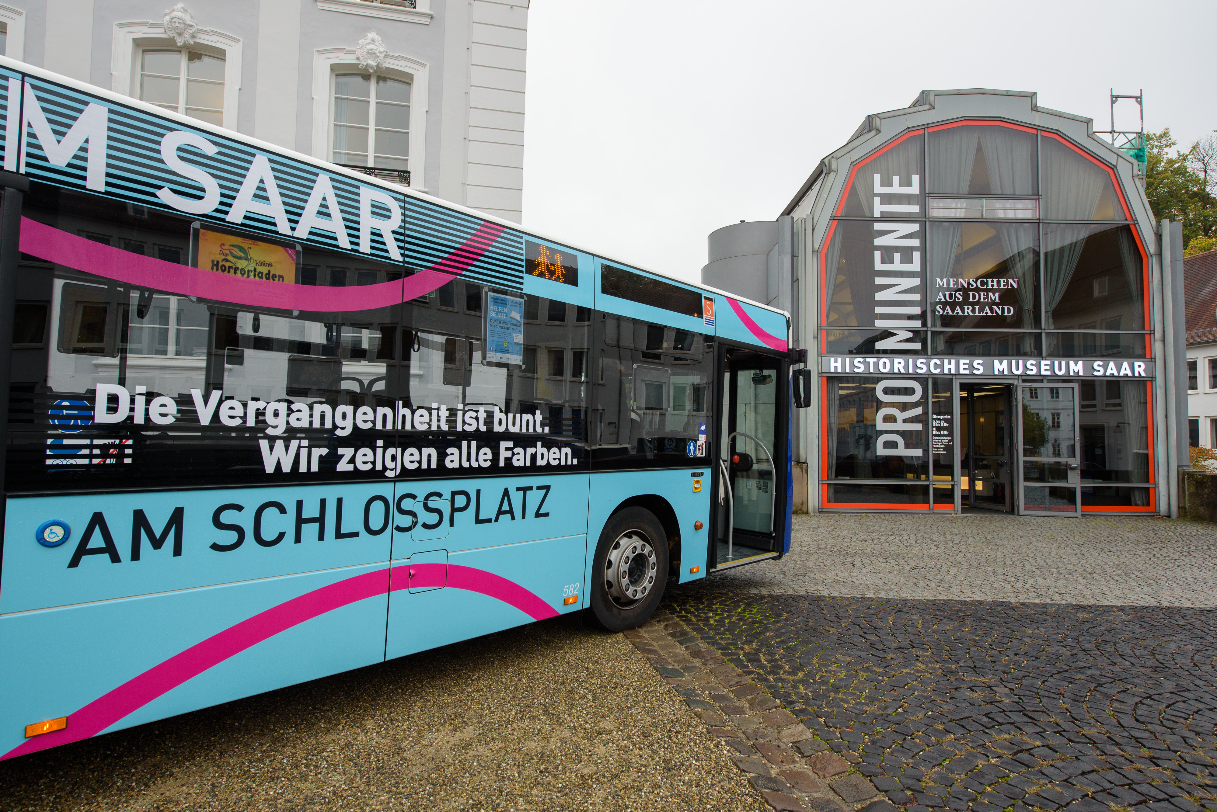 Der Museumsbus wartet auf eine Schulklasse